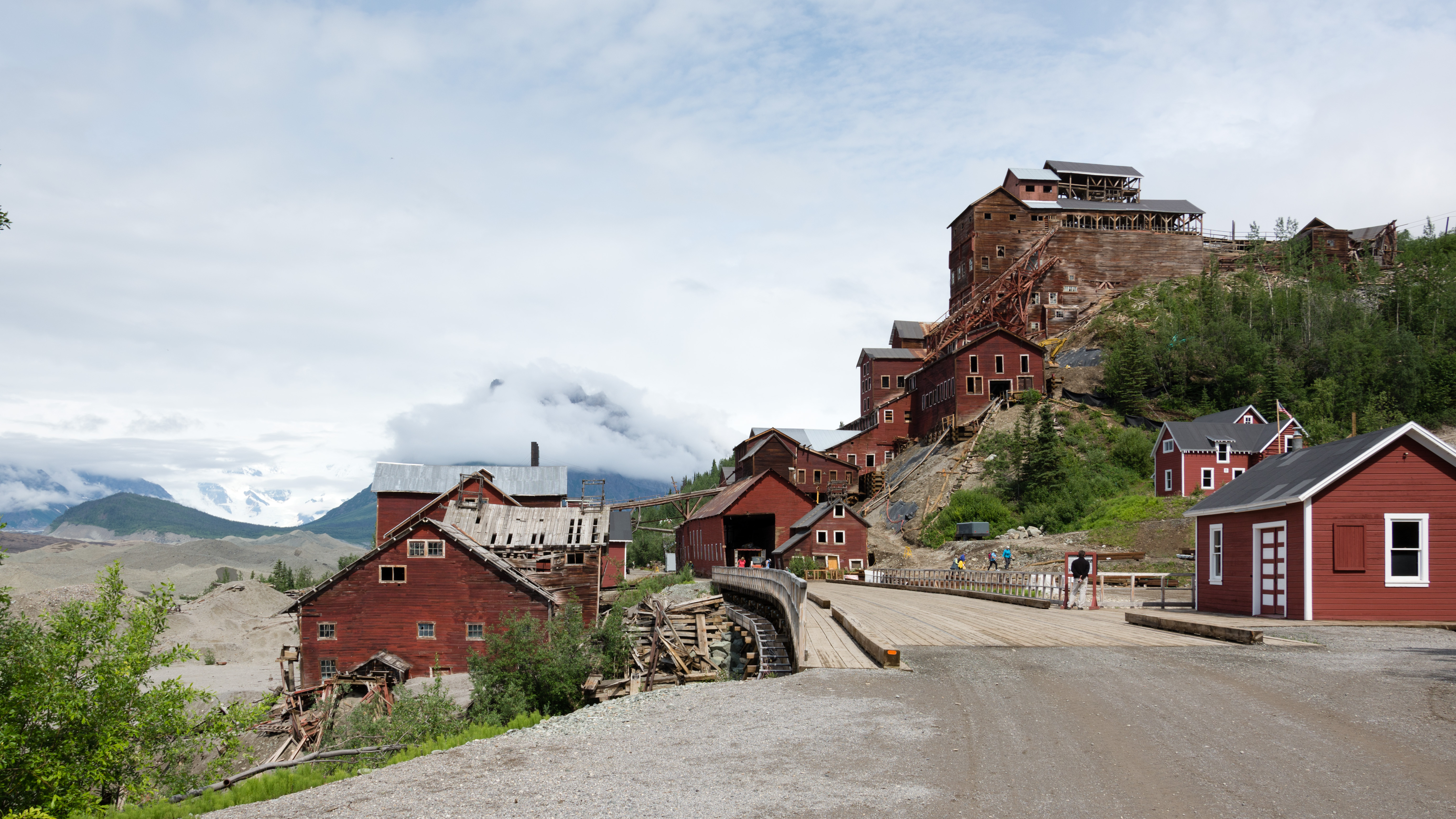 Kennicott